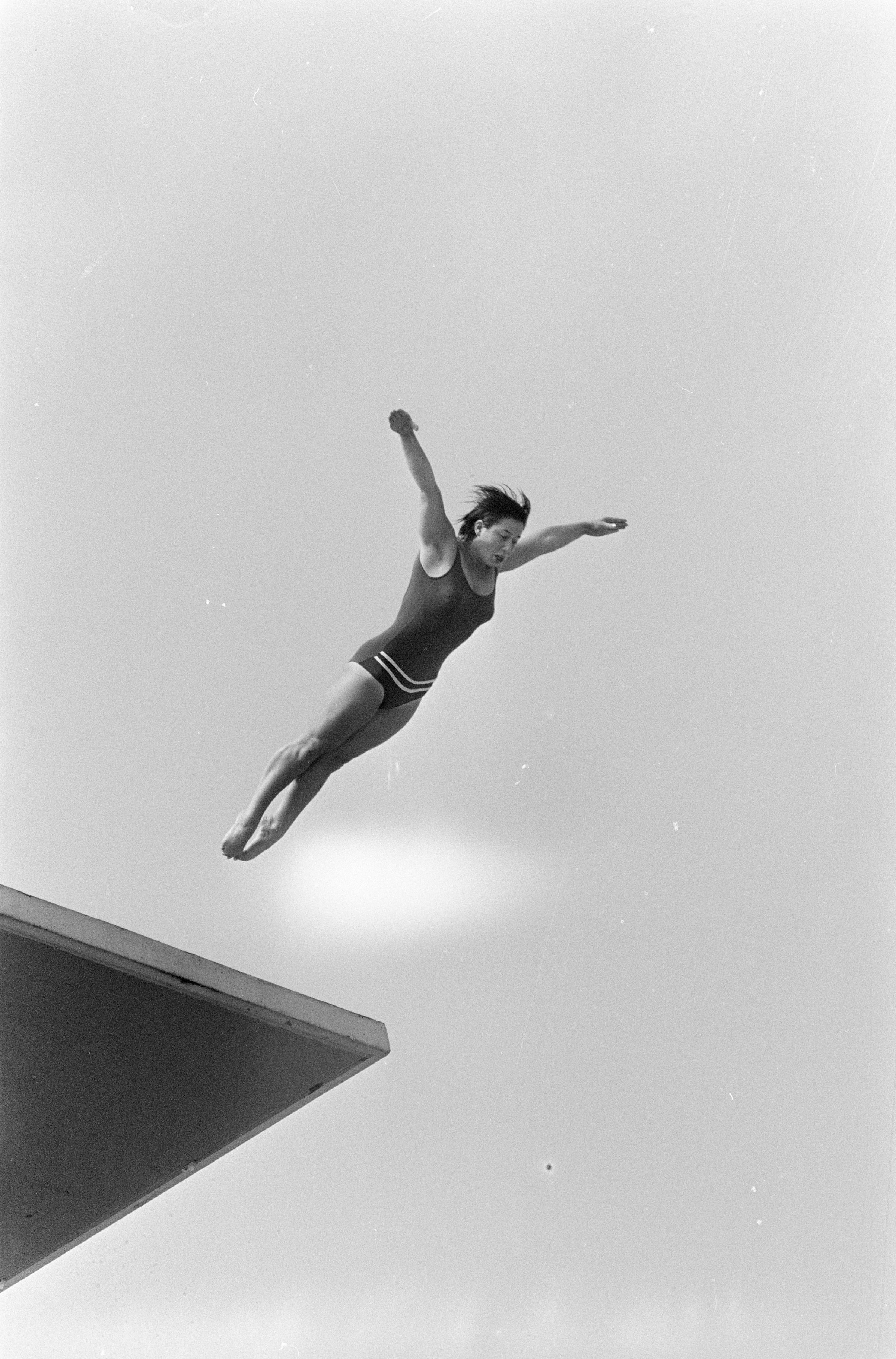 Collectie / Archief : Fotocollectie Anefo Reportage / Serie : [ onbekend ] Beschrijving : Europese Zwemkampioenschappen, Natalia Kusnetsova kampioen torenspringen 10 meter , hier tijdens zweefsprong Datum : 25 augustus 1966 Trefwoorden : kampioenen, zwemkampioenschappen Fotograaf : Kroon, Ron / Anefo Auteursrechthebbende : Nationaal Archief Materiaalsoort : Negatief (zwart/wit) Nummer archiefinventaris : bekijk toegang 2.24.01.05 Bestanddeelnummer : 919-4887